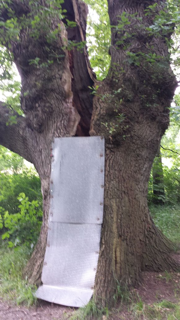 Stamm, mit dem Metallschutz. Gut sichtbar wie ausgehöhlt die Eiche ist.